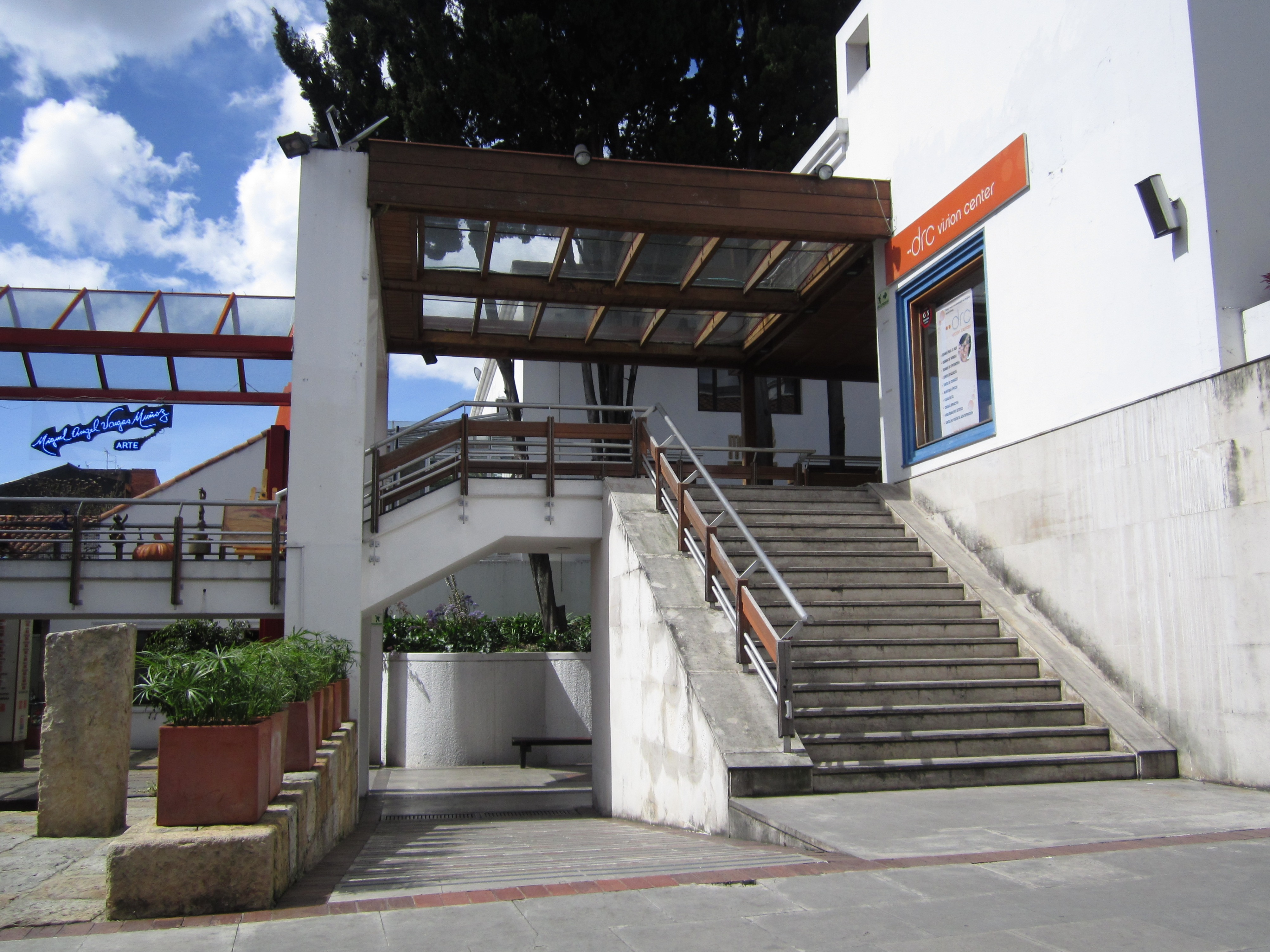 Av. carrera 7, patio interior del centro comercial Hacienda Santa Bárbara. Localidad de Usaquén.